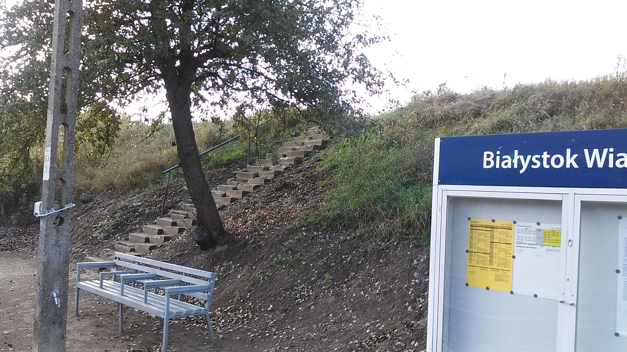 Przystanek kolejowy Białystok Wiadukt - dojście do peronu 2